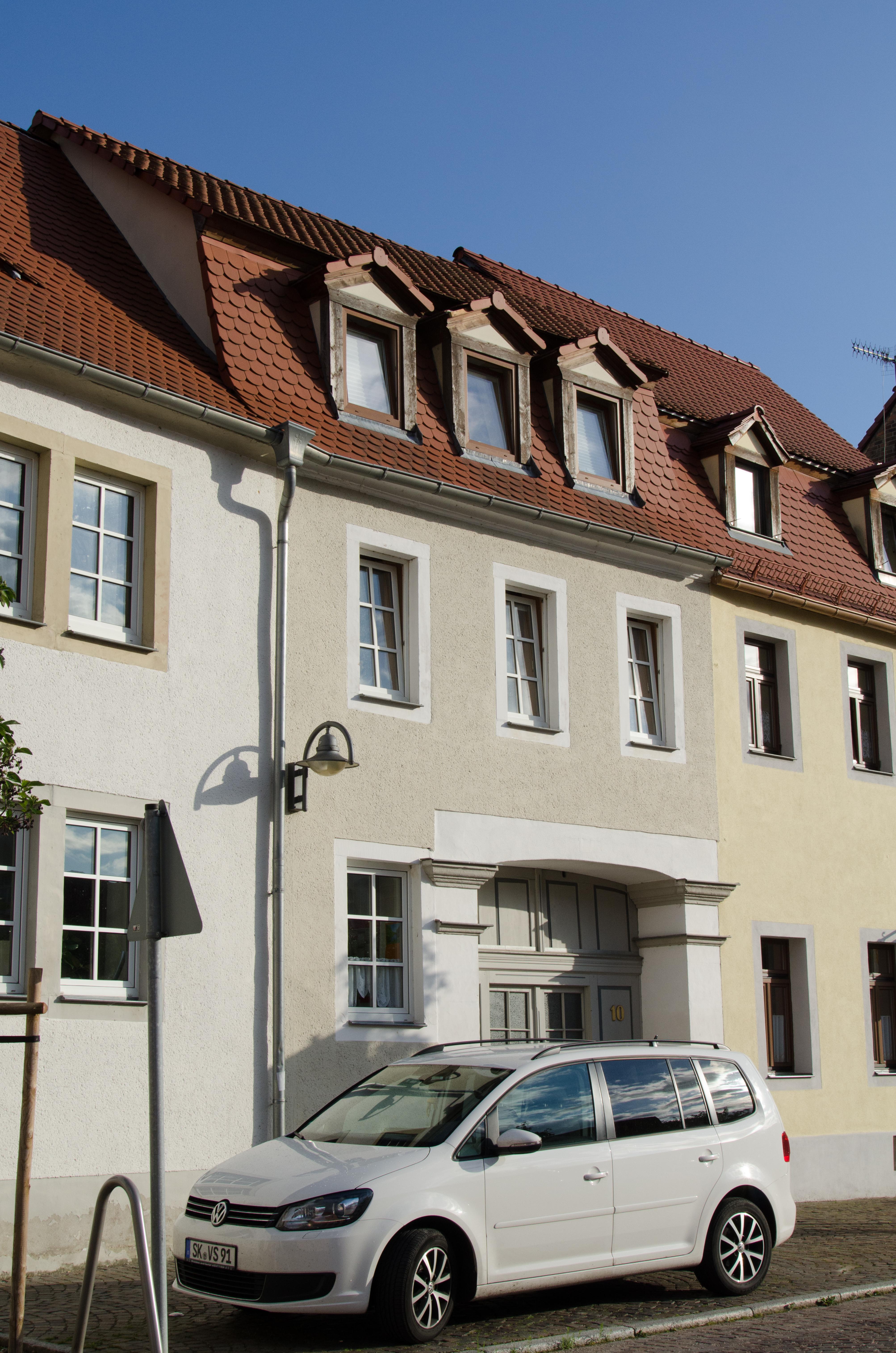 Querfurt, Klippe 10